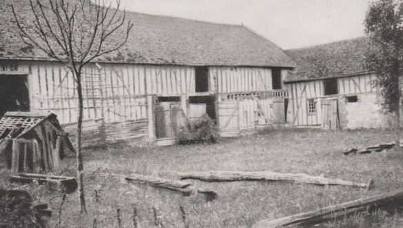 Photo noir et blanc d'une ferme et de sa cour à Isle-Aumont.